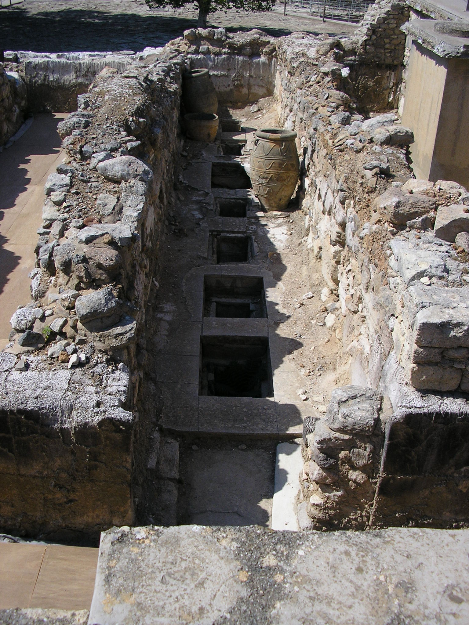 Під величезними амфорами для круп та олії було знайдено схованки, в яких зберігалось дорогоцінне каміння з Єгипту